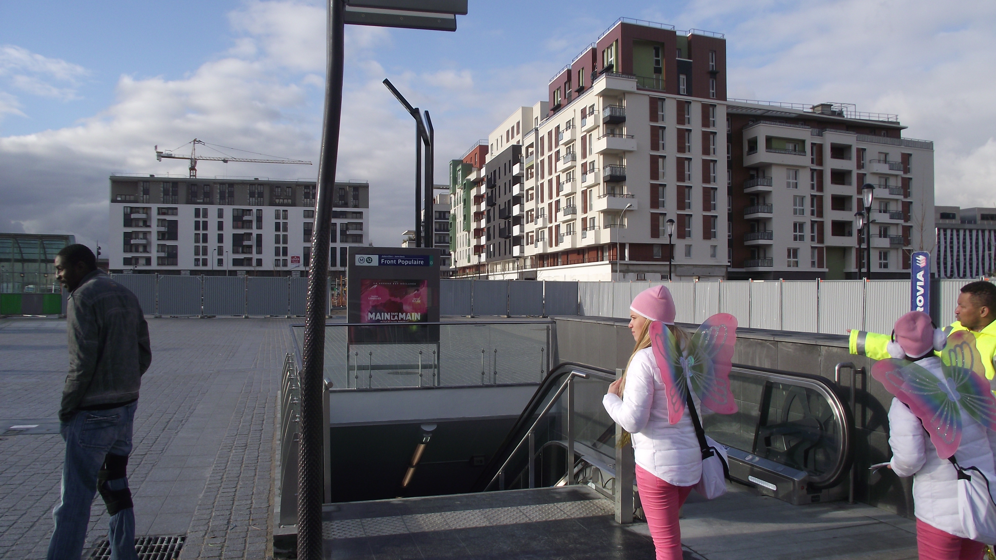 Engelen van een lokaal bedrijf die een promotie aan het maken zijn tijdens de opening.